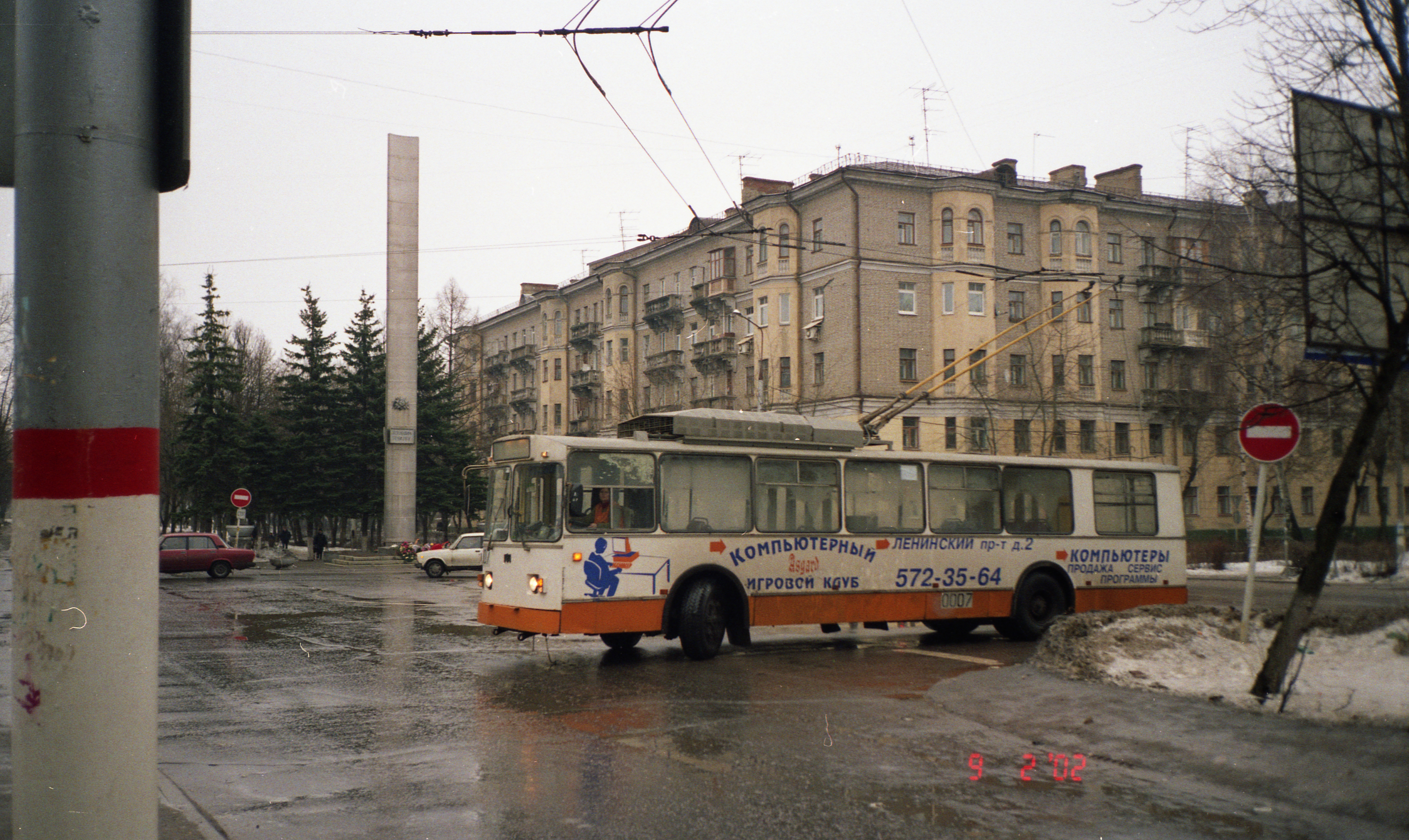 Moscow. Olympus mju-II camera, Konica VX200